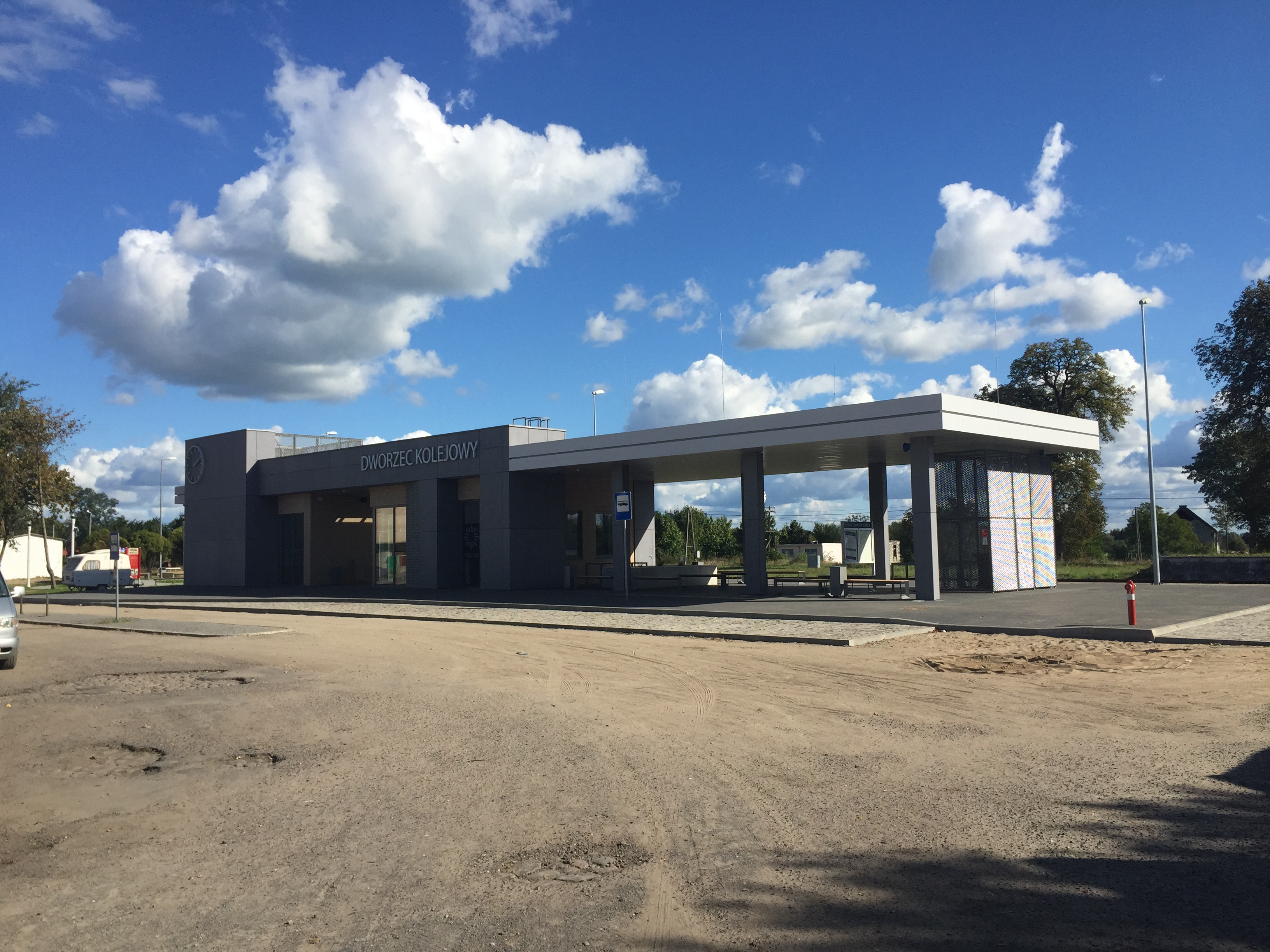 Dworzec systemowy Strzelce Krajeńskie Wschód w Zwierzynie